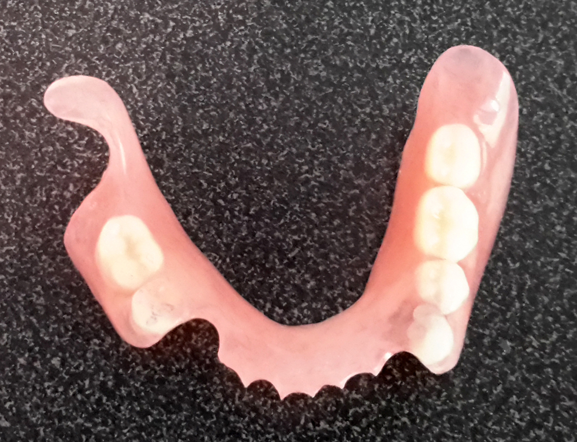 Proteză parţială cu capse